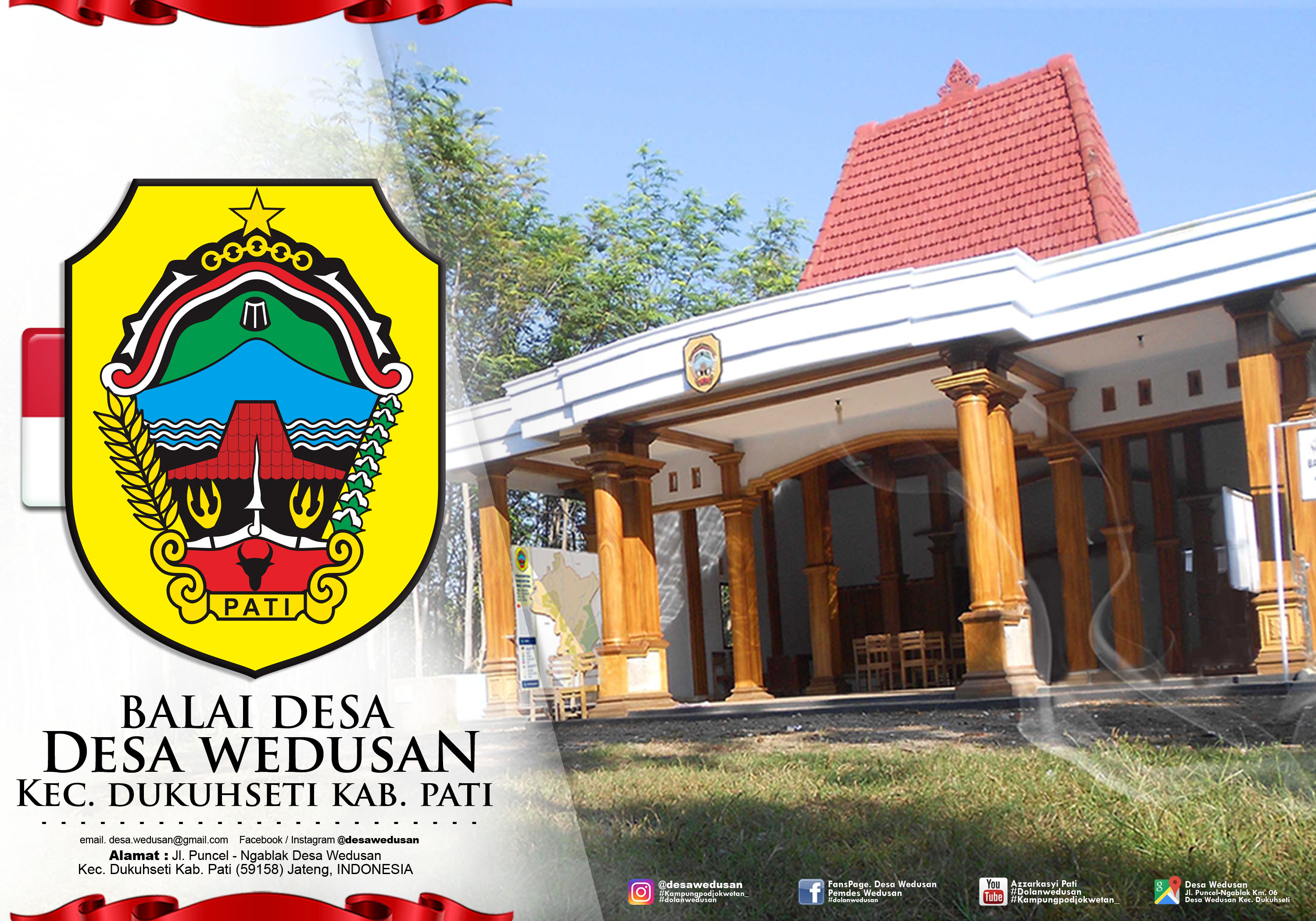 Kantor Balai Desa Wedusan 2017